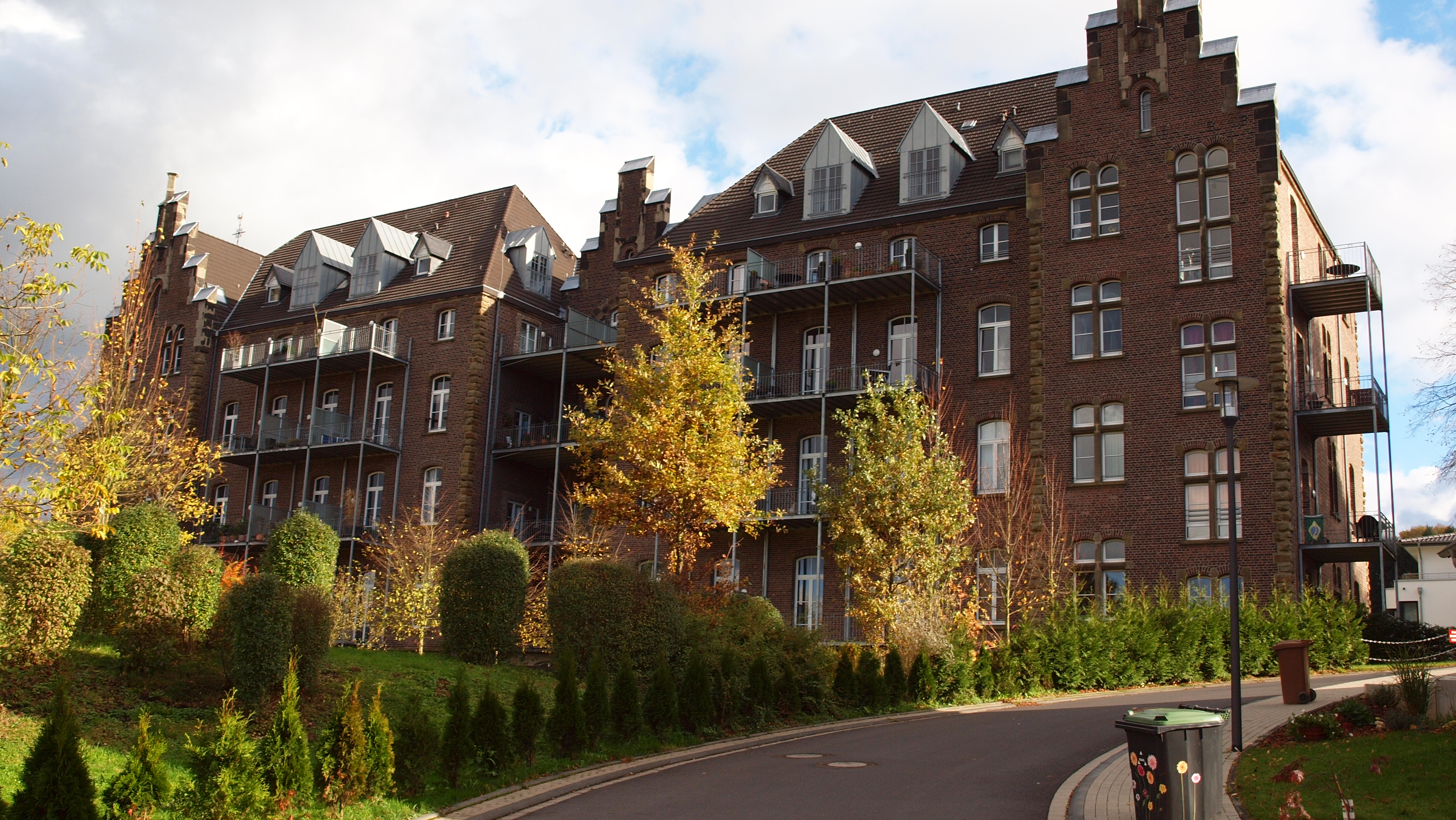 ehemalige Redemptoristenkloster, Klosterstraße 4, Hennef (Sieg)-Geistingen